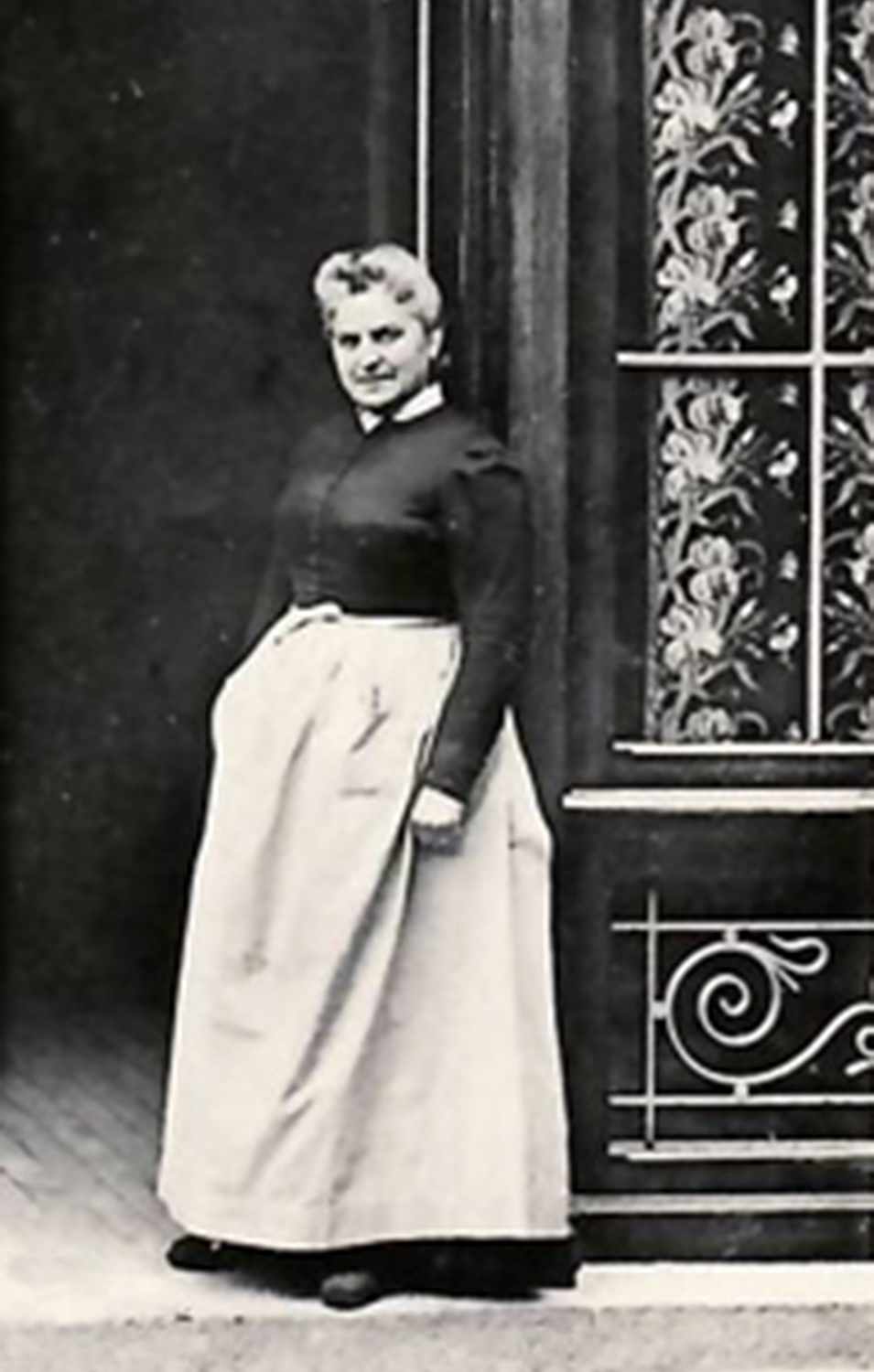 Mère Poulard devant sa boutique